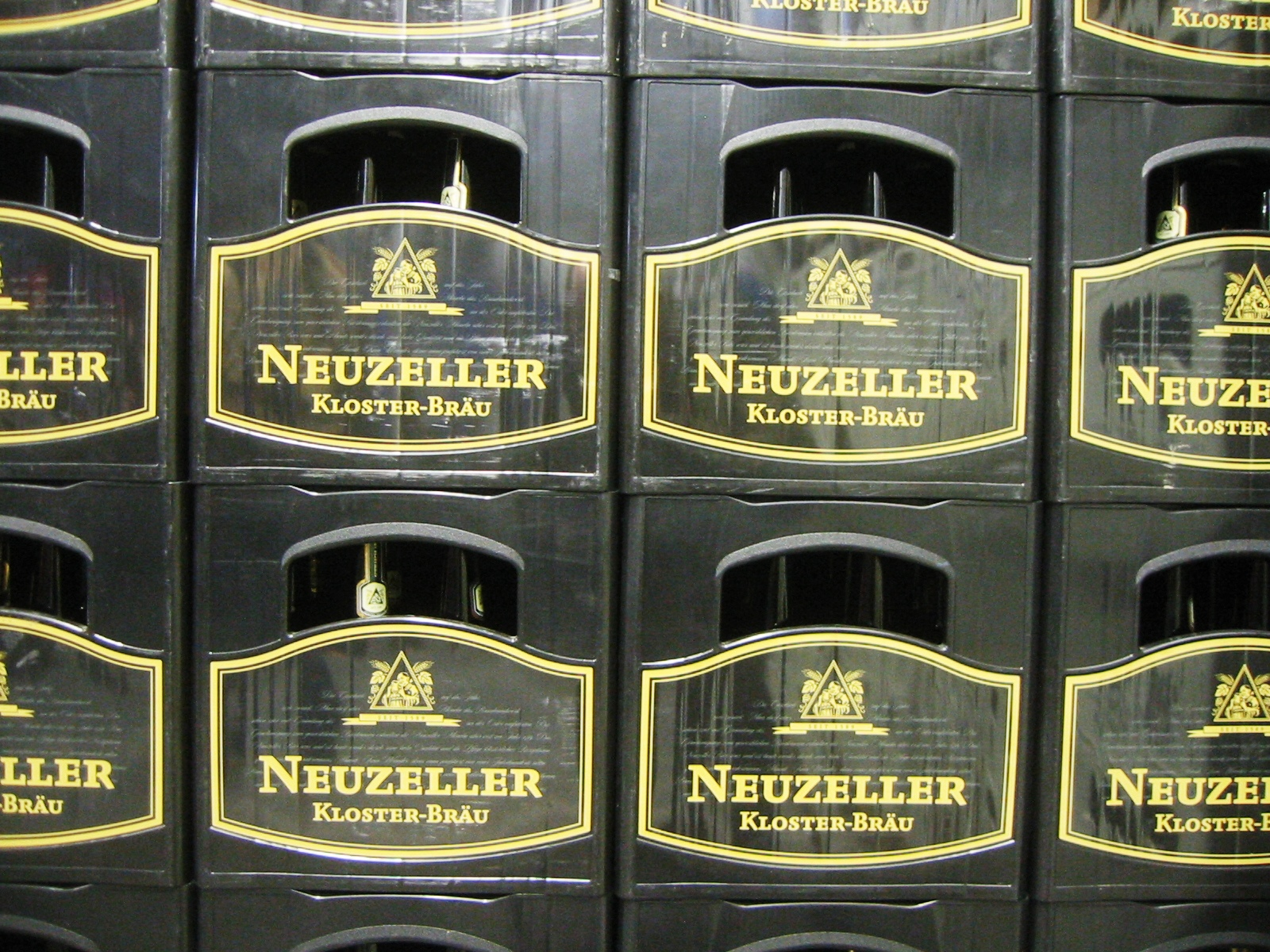 Bierkisten der Klosterbrauerei in Neuzelle im Landkreis Oder-Spree, Brandenburg, Deutschland. 2012 entschied die Brauerei, sukzessive auf neue, schwarze Bierkisten umzuschwenken.